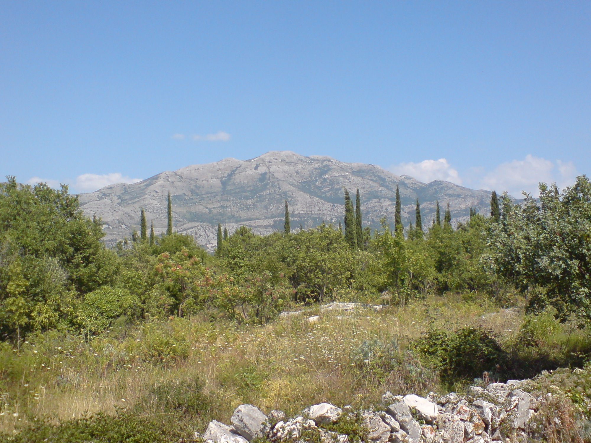 Snježnica mountain in Konavle near Dubrovnik, Croatia